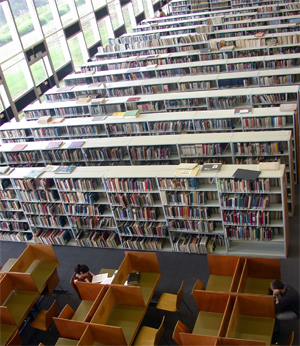 אוספי הספרייה